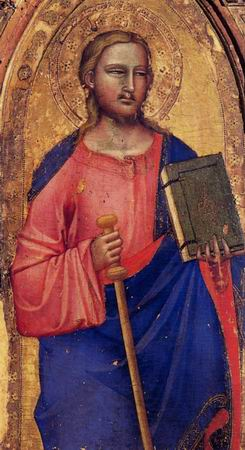 Museo dell'opera del duomo, prato, San Giacomo (1370 circa) Giovanni Bonsi